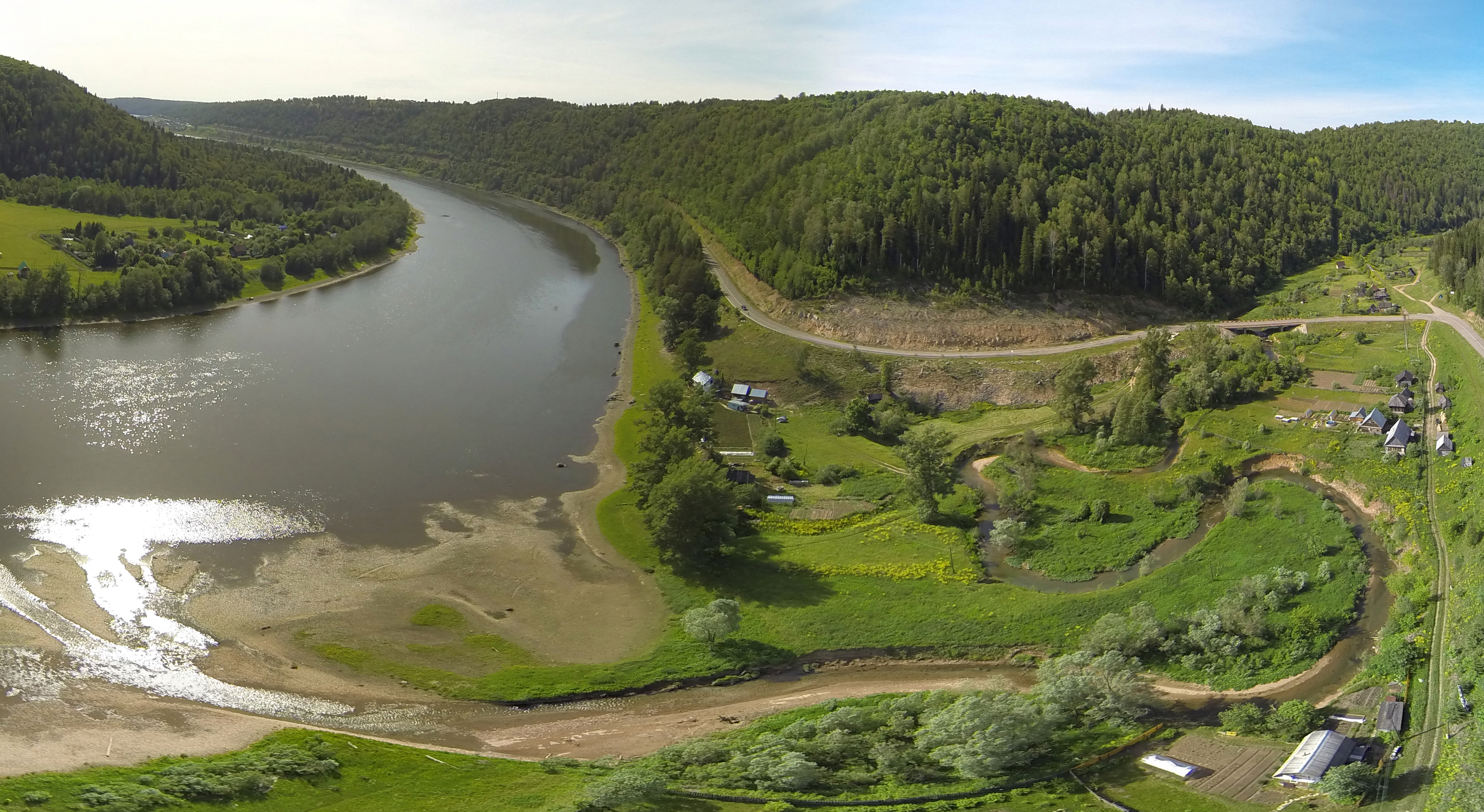 Реки Яман-Елга, Сарва и их окрестности, Нуримановский район This image is related to the protected area of Russia number 0210192